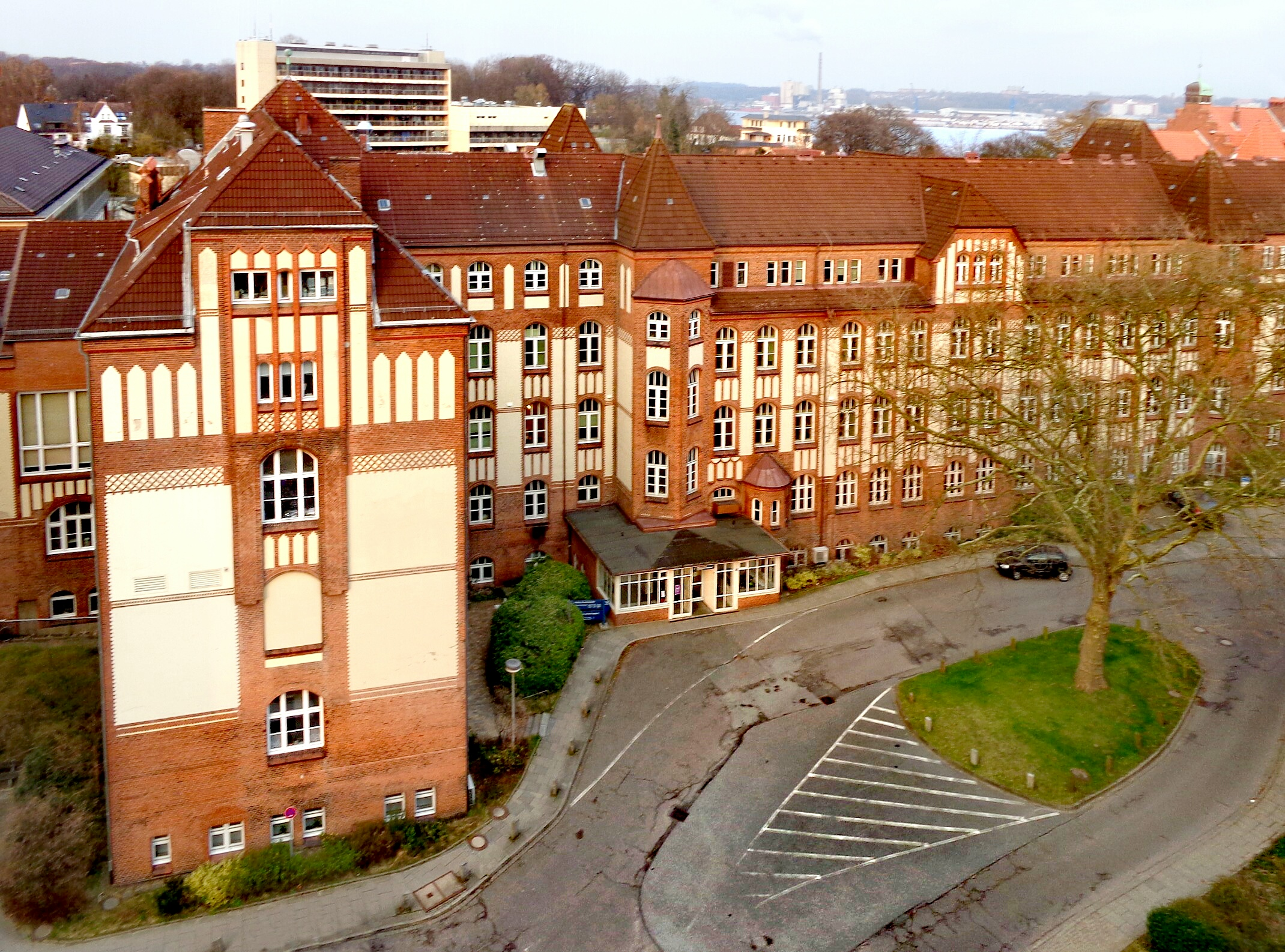 Früheres Gebäude der Chirurgischen Universitätsklinik Kiel. Dahinter die „neue“ Kinderklinik am Schwanenweg. Im Hintergrund die Kieler Förde.